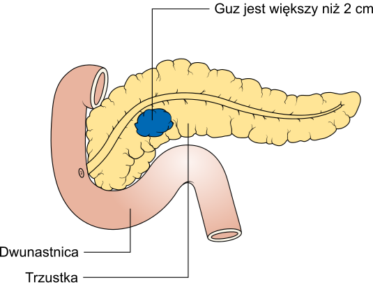 Cecha T2 w TNM raka trzustki